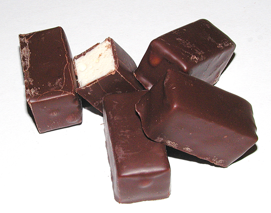 Ptasie mleczko, oder auch Vogelmilch